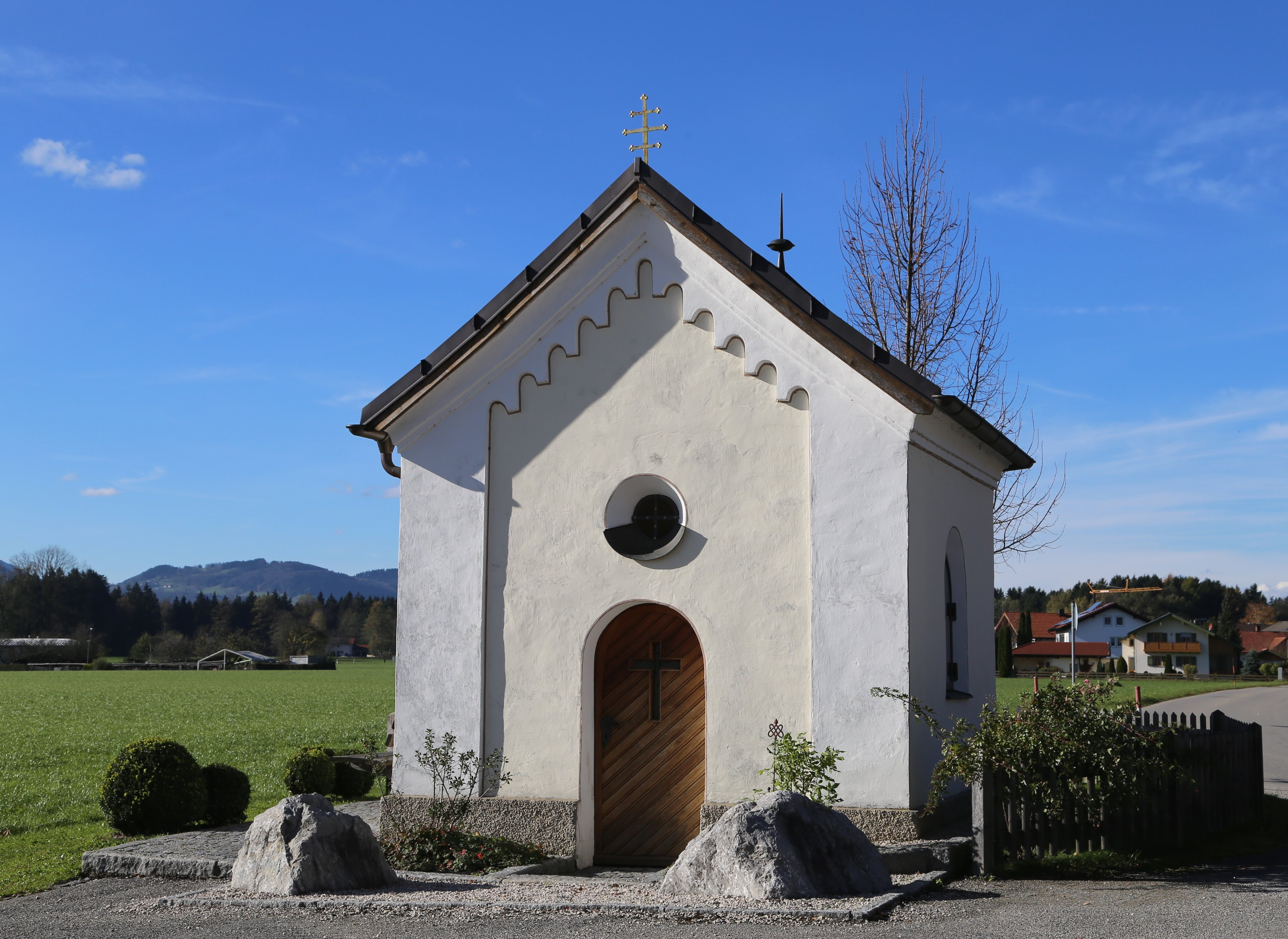 Nicklheimer Straße, Kapelle, Satteldachbau mit Rundbogenfenstern und Putzgliederungen im neuromanischen Stil, 1837, 1908 Umbau; mit Ausstattung.